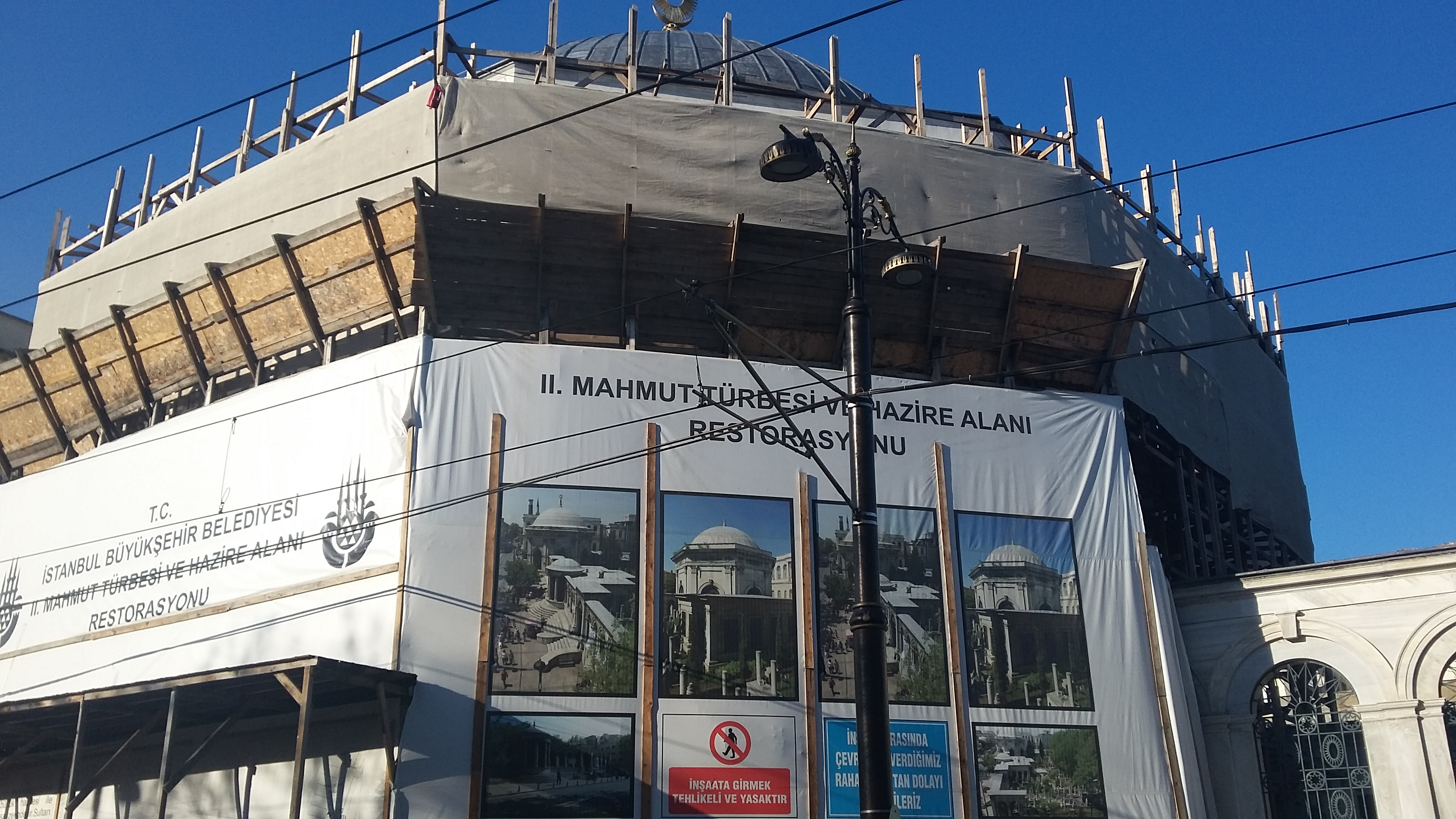 Sultan II. Mahmud Türbesi restorasyon çalışması, cadde görünümü; 2017